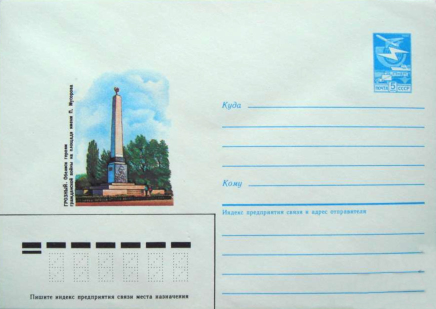 Конверт СССР